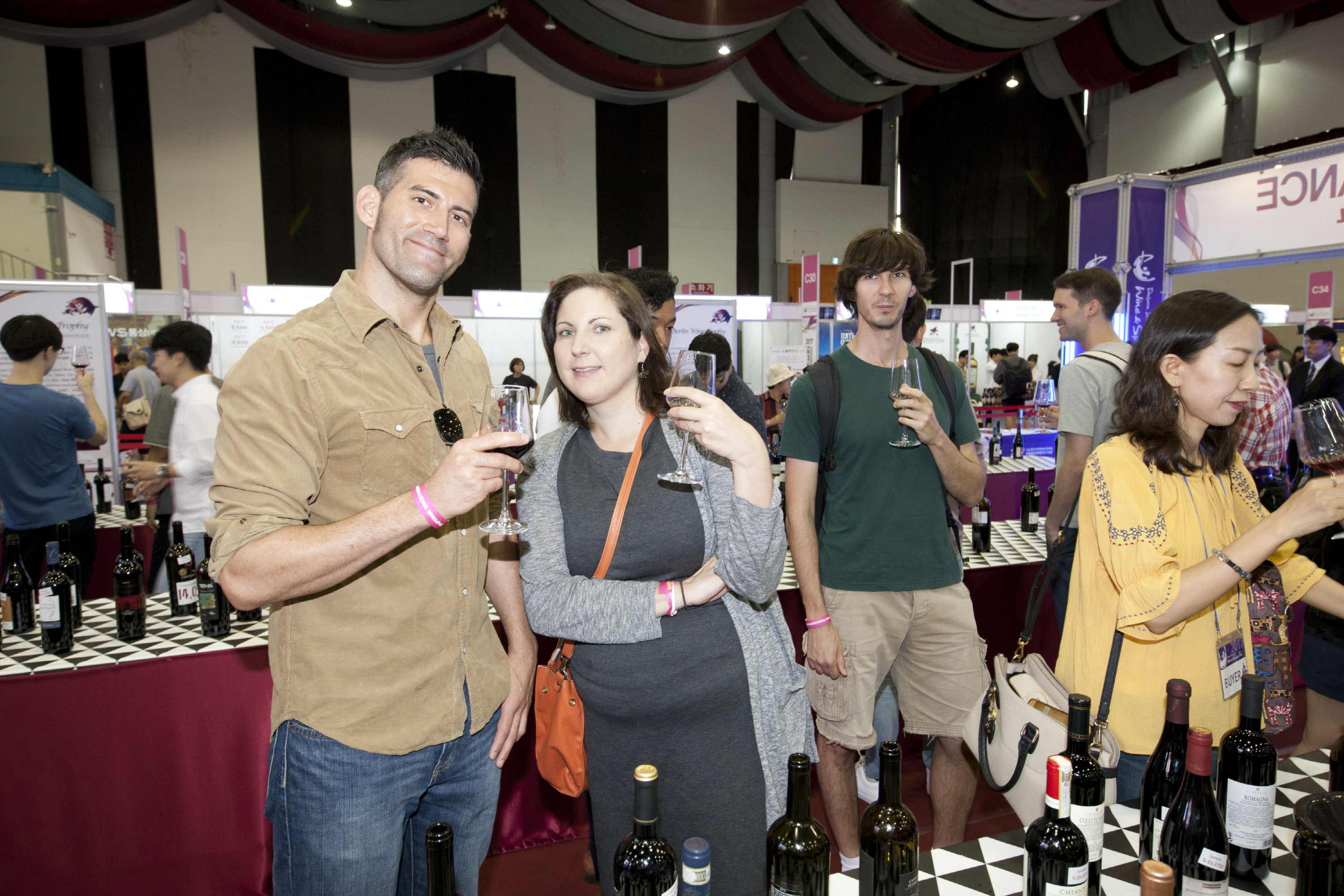 2017 대전국제와인페스티벌 6